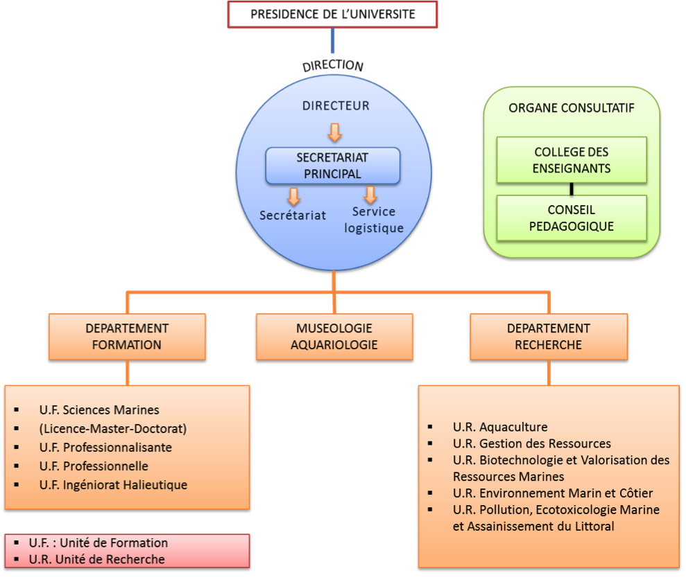 Organigramme de l'IH.SM